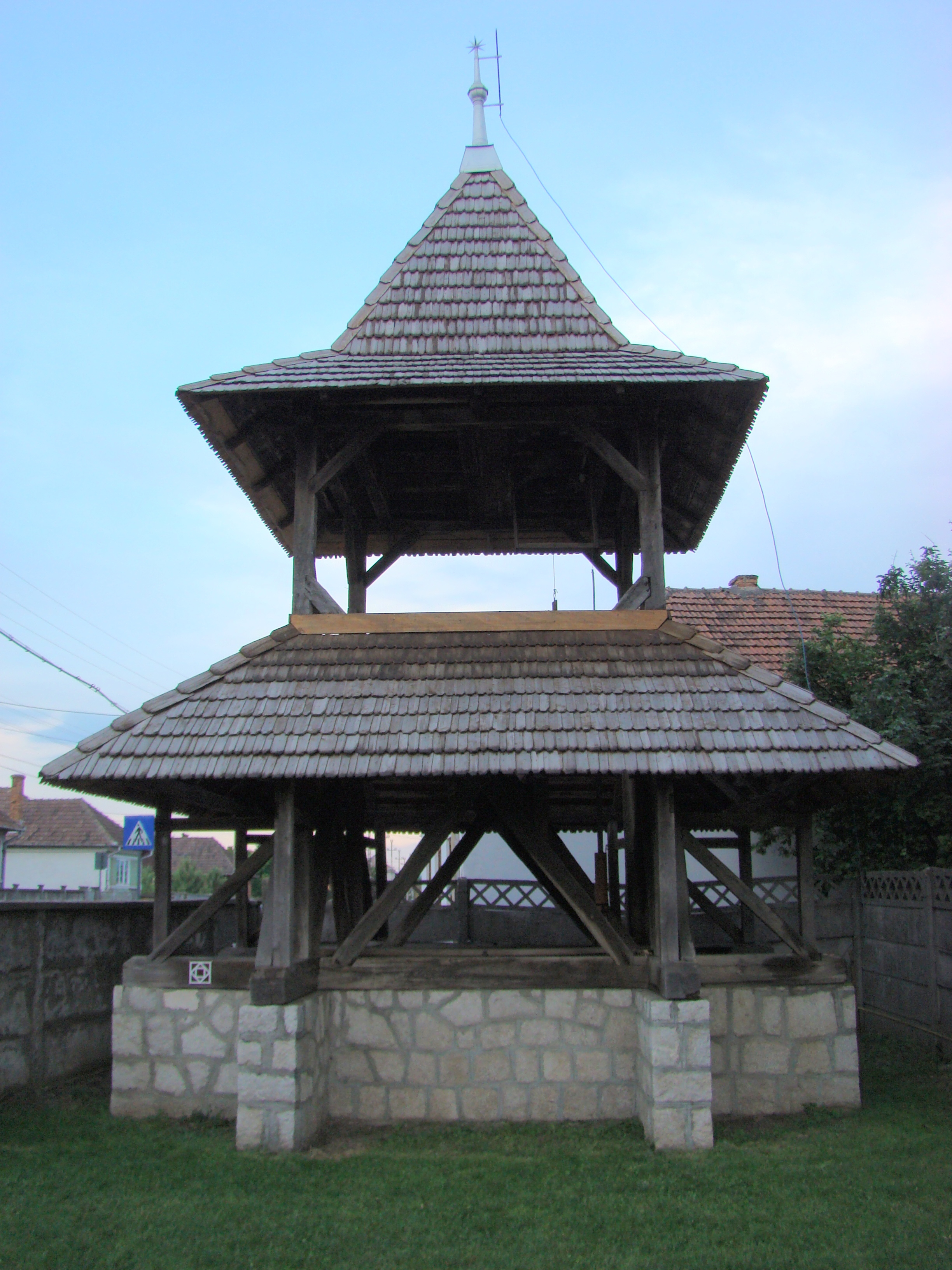 Clopotnița de lemn a bisericii reformate, sat aparținător Sâncrai; municipiul Aiud, județul Alba 02